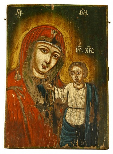 Фрагмент абраза “Маці Божая Казанская”. Лік Маці Божай. ХVIII ст. Дошка, алей. Бабіцкая школа іканапісу. З фондаў ВМНТ імя Ф.Р. Шклярава.